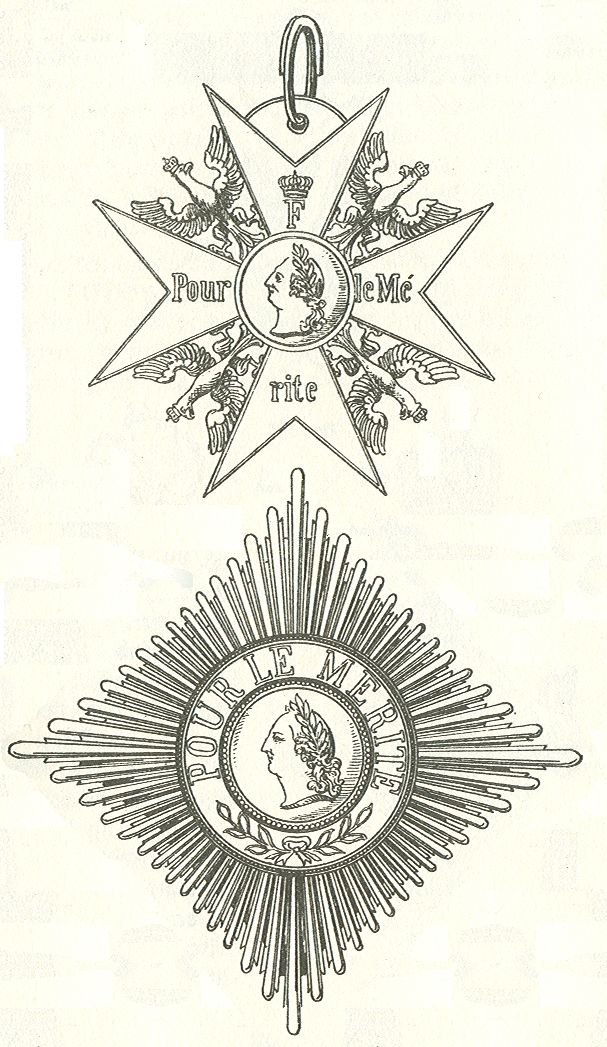 Scan van Blz. 356 en 357 van het boek "Handbuch der Ritter- und Verdienstorden " uitgegeven 1893 door Weber.Tekening van de in 1902 overleden Maximilian Gritzner. Robert Prummel 10 jul 2008 16:40 (CEST)